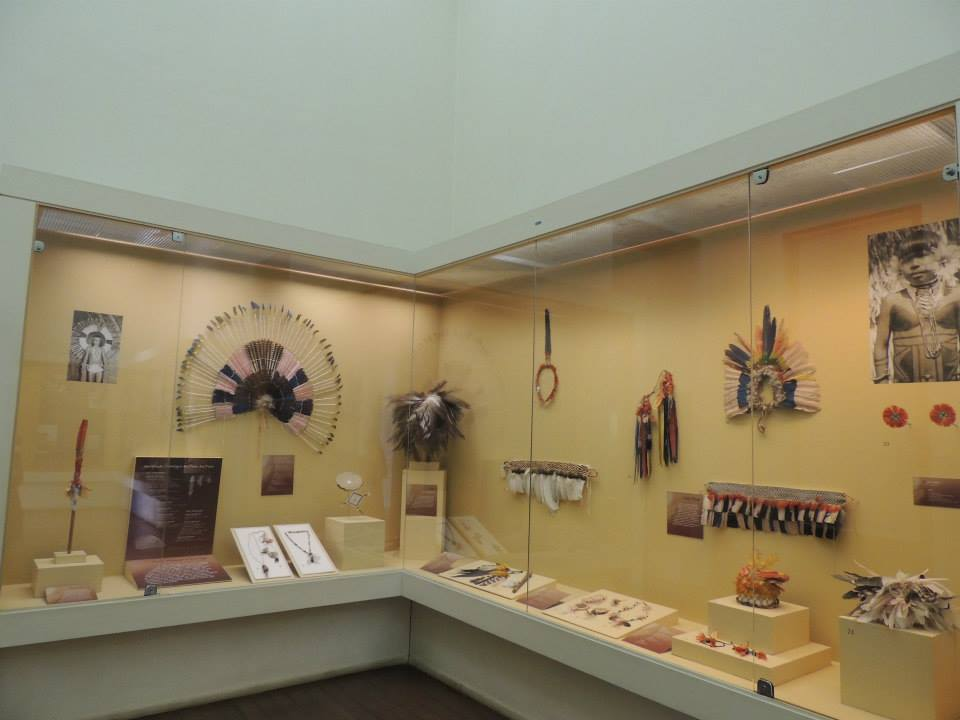 Museu Nacional, inclusive a Coleção Arqueológica Balbino de Freitas